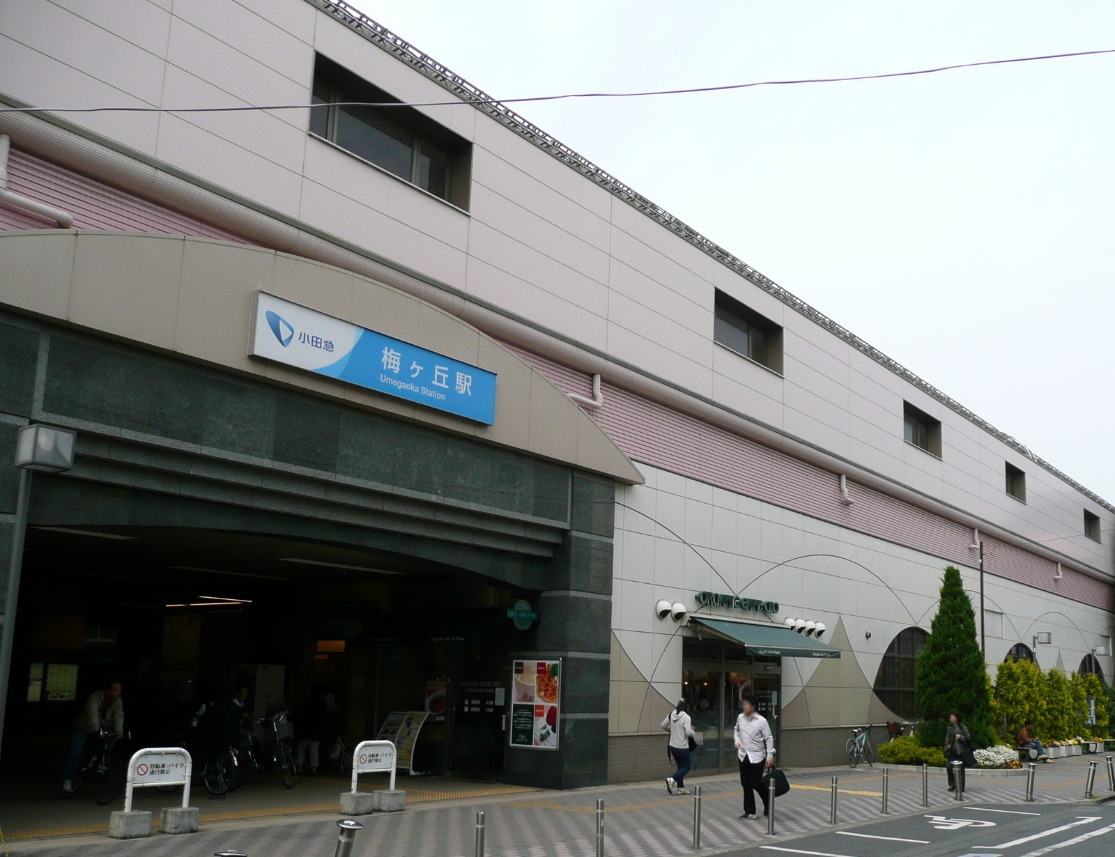 梅ヶ丘駅南口